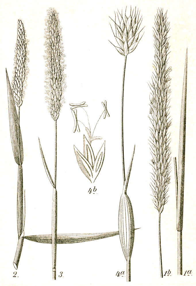 1: Alopecurus myosuroides Huds., syn. Alopecurus agrestis L. 2: Alopecurus geniculatus L. 3: Alopecurus aequalis Sobol., syn. Alopecurus fulvus Sm. 4: Alopecurus rendlei Eig Original Caption 1. Acker-Fuchsschwanz, Alopecurus agrestis L. 2. Knie-Fuchsschwanz, A. geniculatus L. 3. Rotgelber Fuchsschwanz, A. fulvus L. 4. Schlauch-Fuchsschwanz, A. utriculatus Pers.